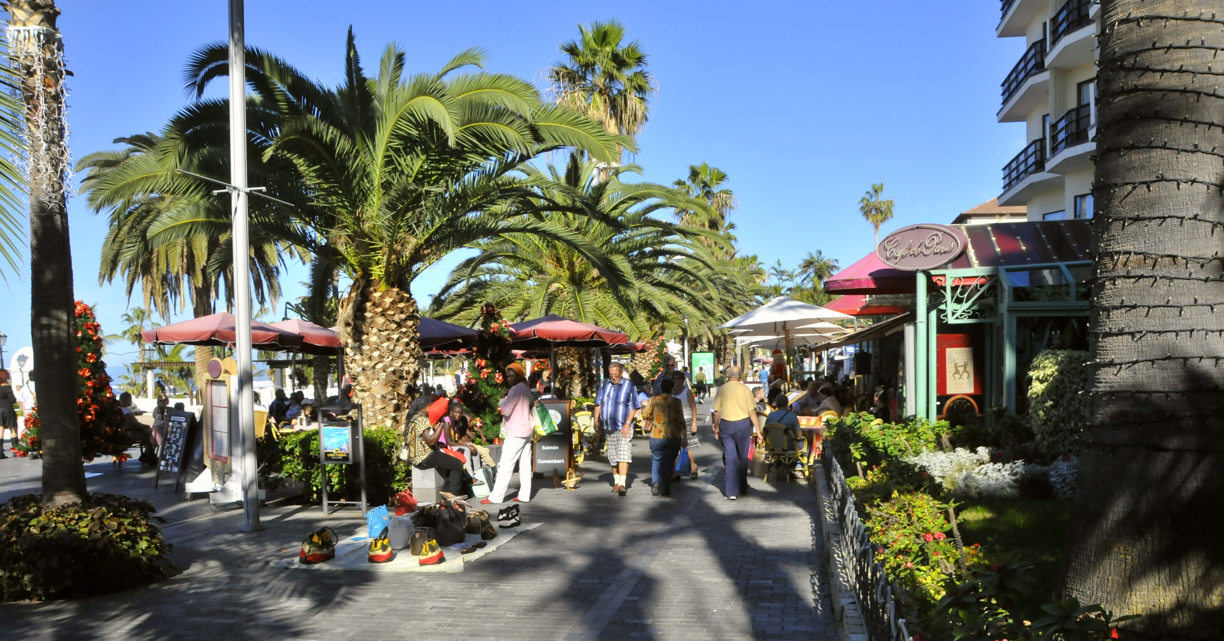 Puerto de la Cruz, Promenade Martiánez